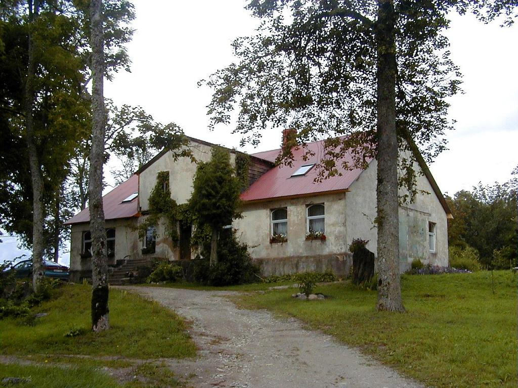 Mazozolu muižas pils 2003-08-16